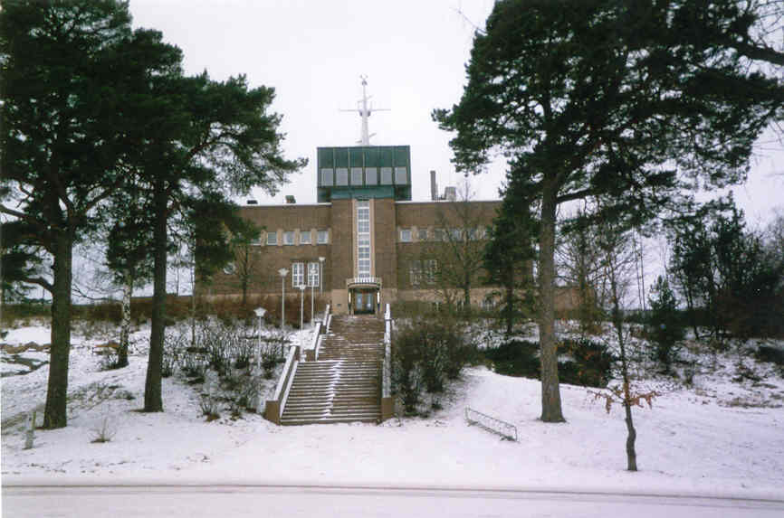 Maarianhaminan merenkulkuopisto